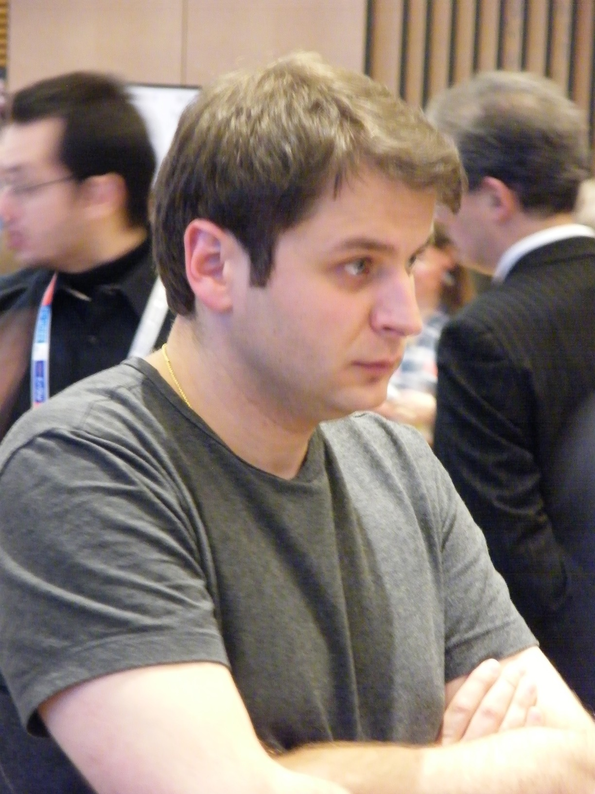 Juri Schulmann bei der 38. Schacholympiade in Dresden 2008